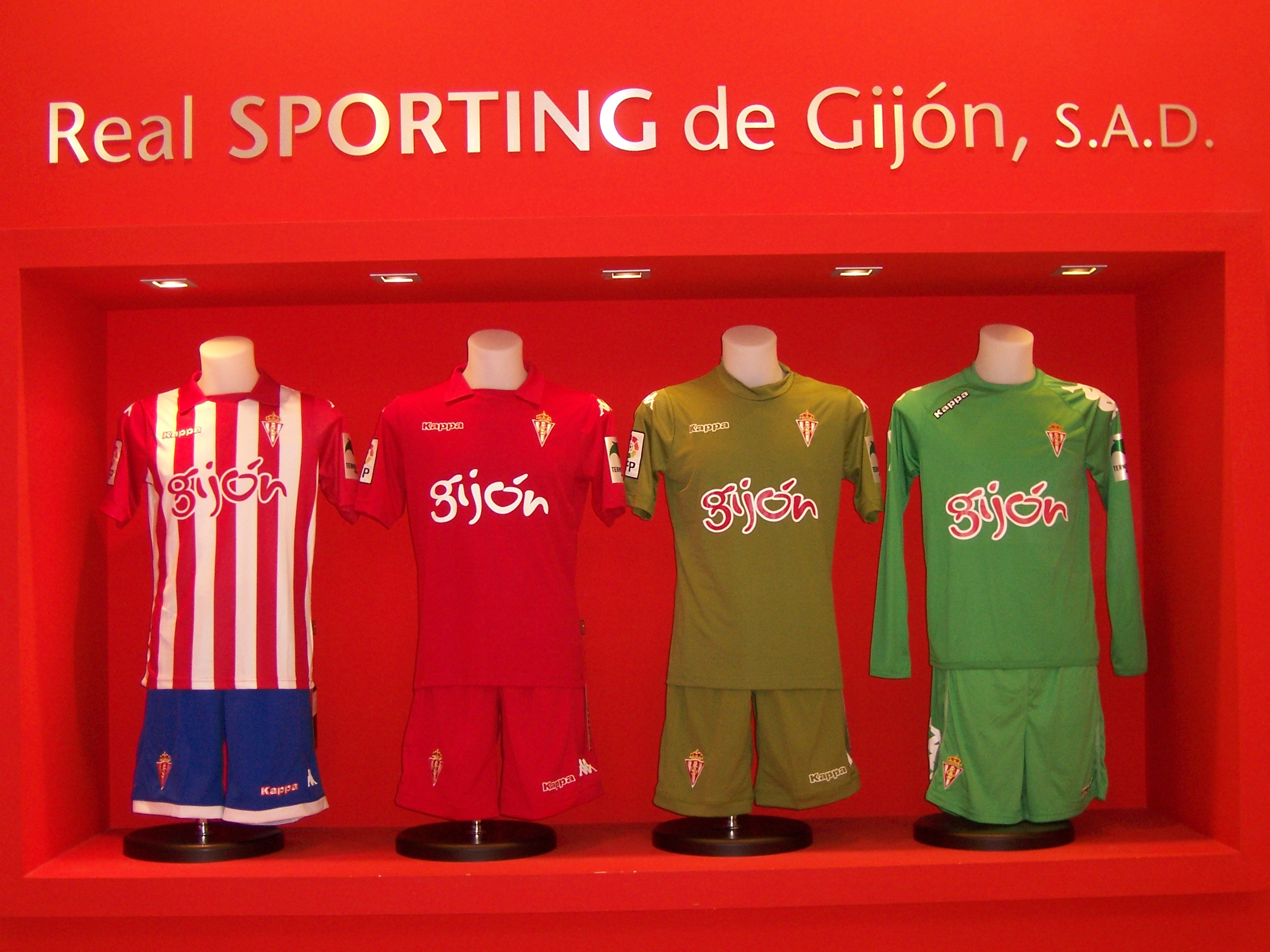 Uniformidad del Real Sporting en el escaparate de la tienda oficial. Temporada 2013-14